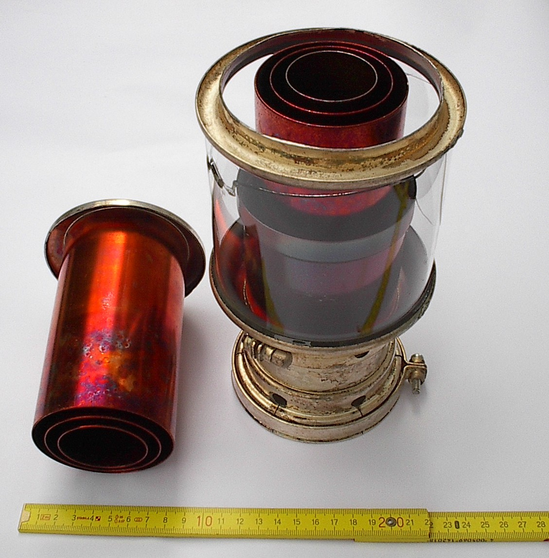 Bildbeschreibung: Vacuumkondensator RK 500 von Telefunken, aufgesaegt. Quelle: Eigenes Foto Fotograf: Ty von Sevelingen Datum: 31.05.2006 Sonstiges